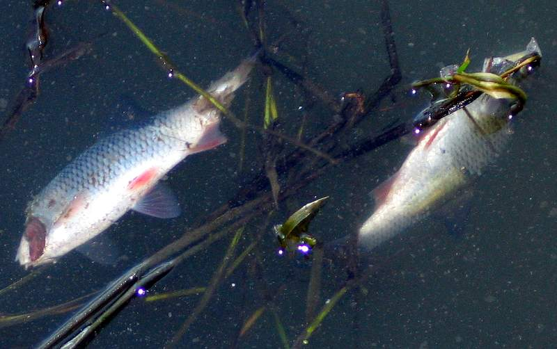 Die toten Fische schwamen Kiel oben in einem Zulauf in die Ostsee.